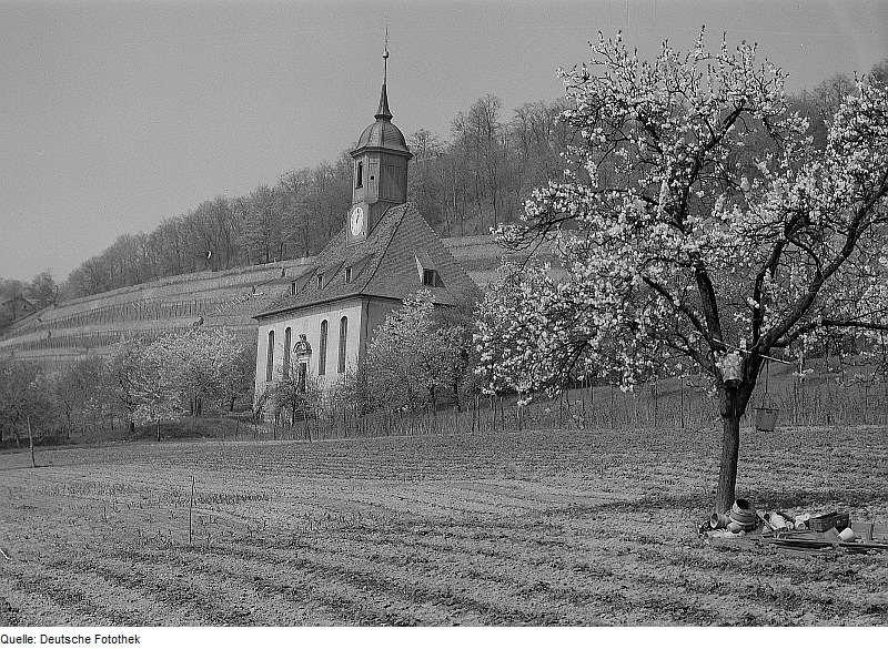 Original image description from the Deutsche Fotothek Dresden-Pillnitz. Weinbergkirche „Zum Heiligen Geist“